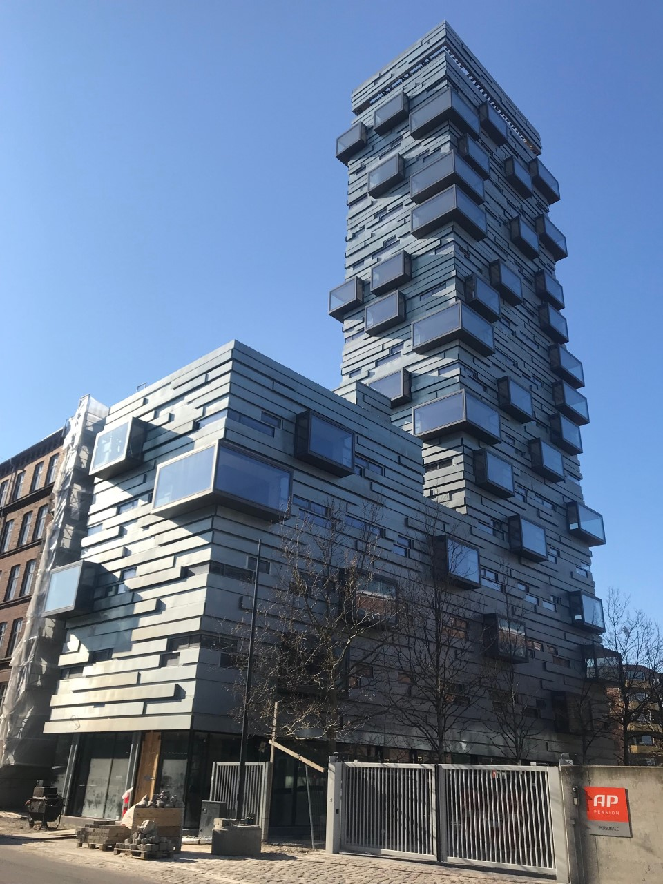 Charlottehavens højhus er 54 meter højt og indeholder 37 hotellejligheder, her under opførsel, april 2019